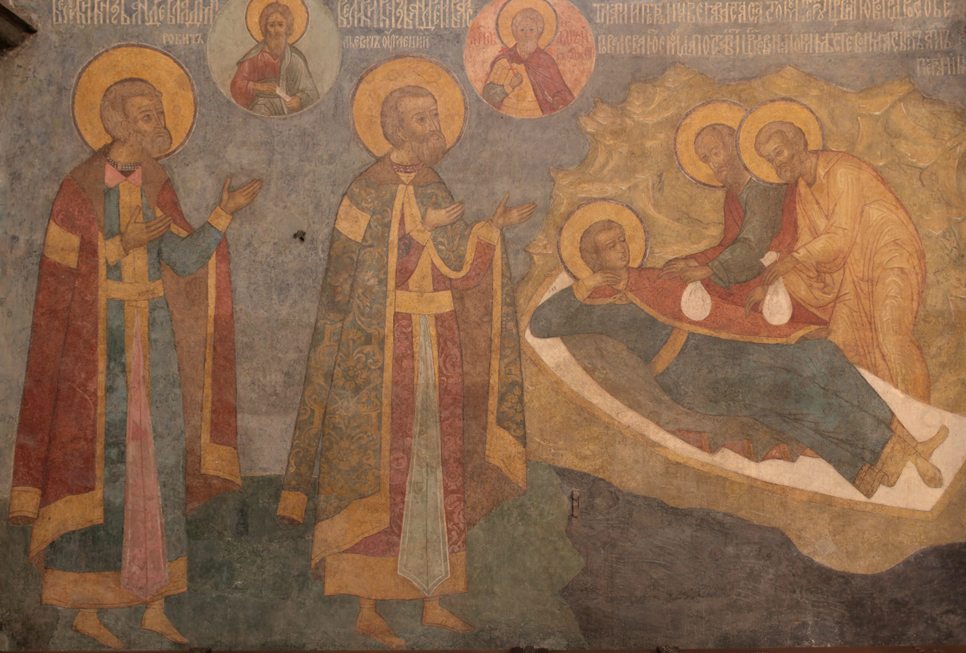 АРХАНГЕЛЬСКИЙ СОБОР СТЕНОПИСЬ НАДГРОБНЫЕ ПОРТРЕТЫ КНЯЗЕЙ Андрей Владимирович Радонежский Андрей Васильевич Углецкий (Большой) Сон ордынского царевича Петра .